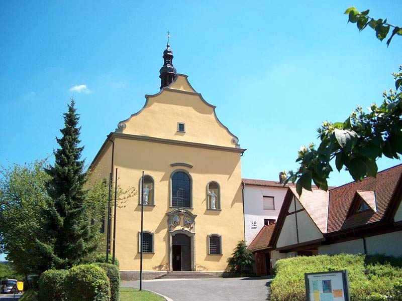 Die Wallfahrtskirche von Osten. Mit der Pforte des Kloster Schwarzenberg.